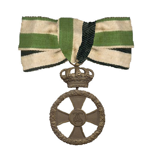 Orden für Verdienste von Frauen und Jungfrauen in der Kriegsfürsorge Sachsen-Meiningen